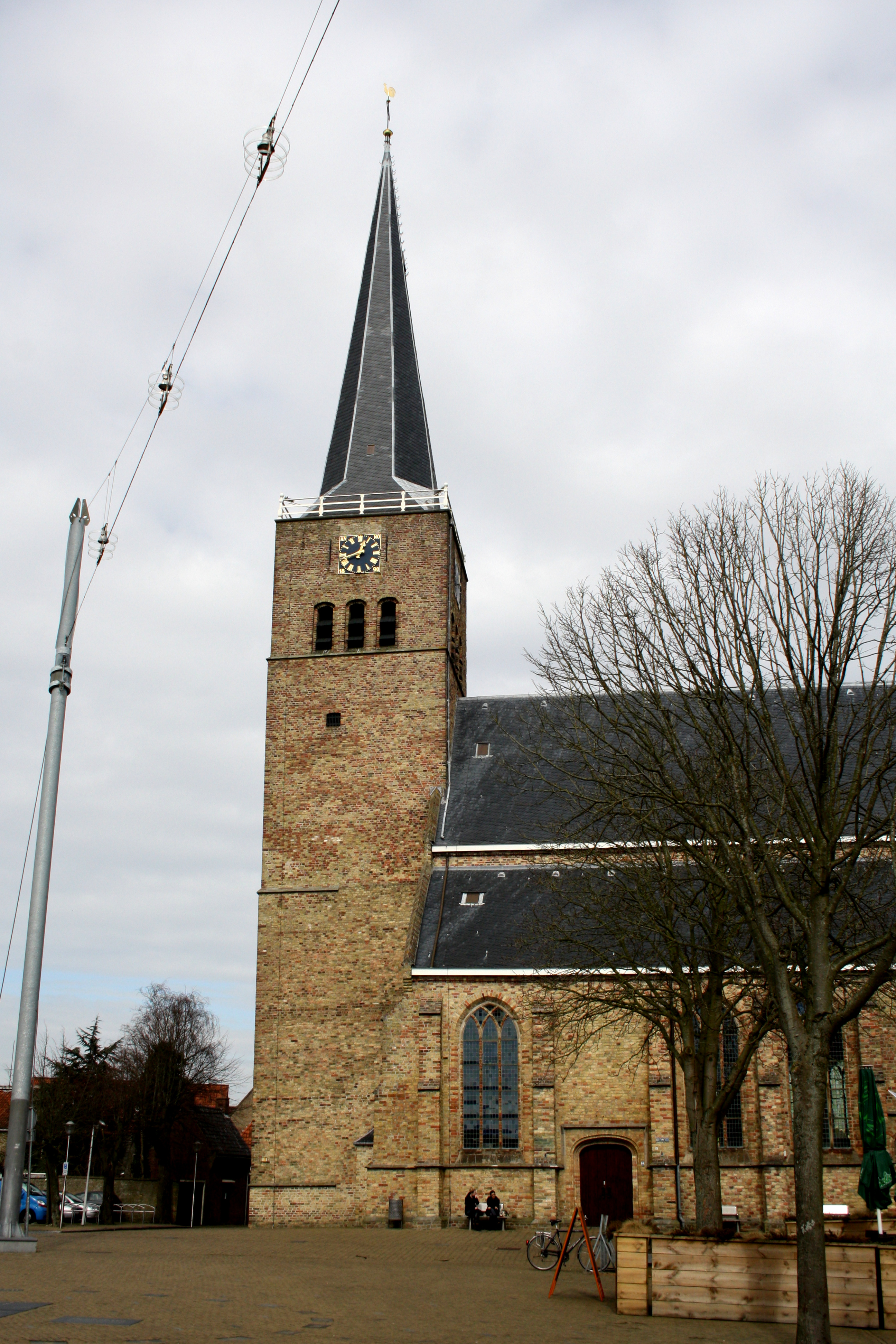 Franeker - Martinikerk - gezicht vanaf het plein